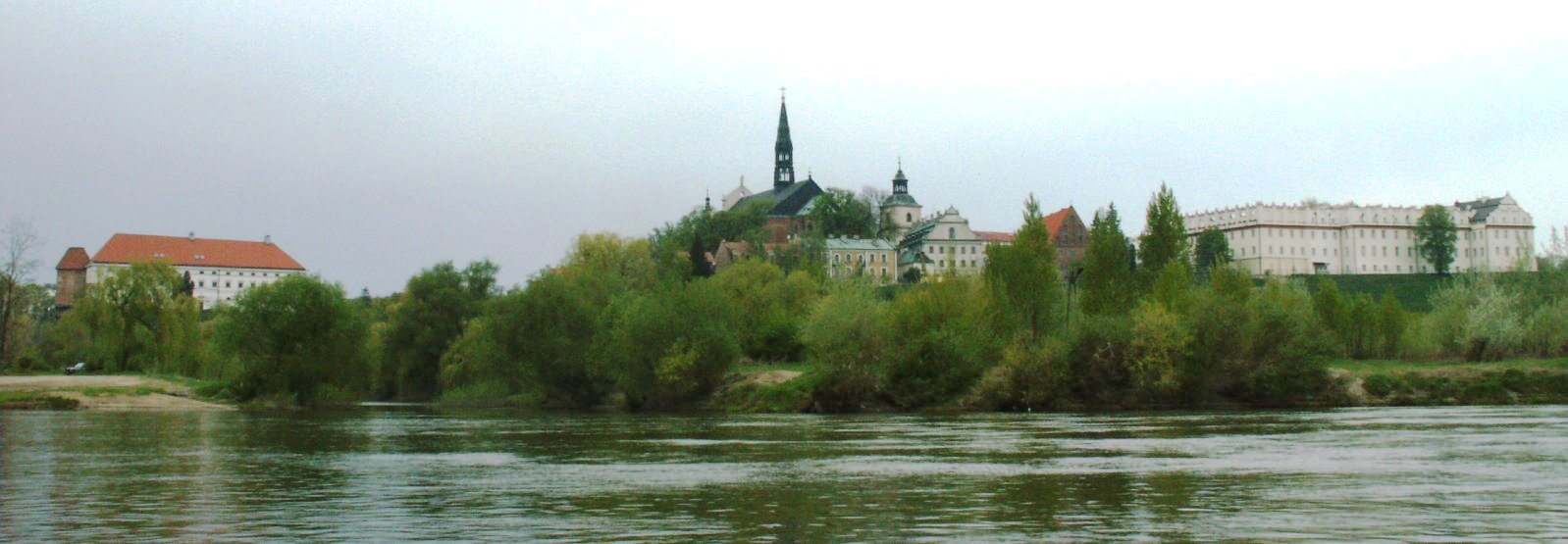 Sandomierz Panorama